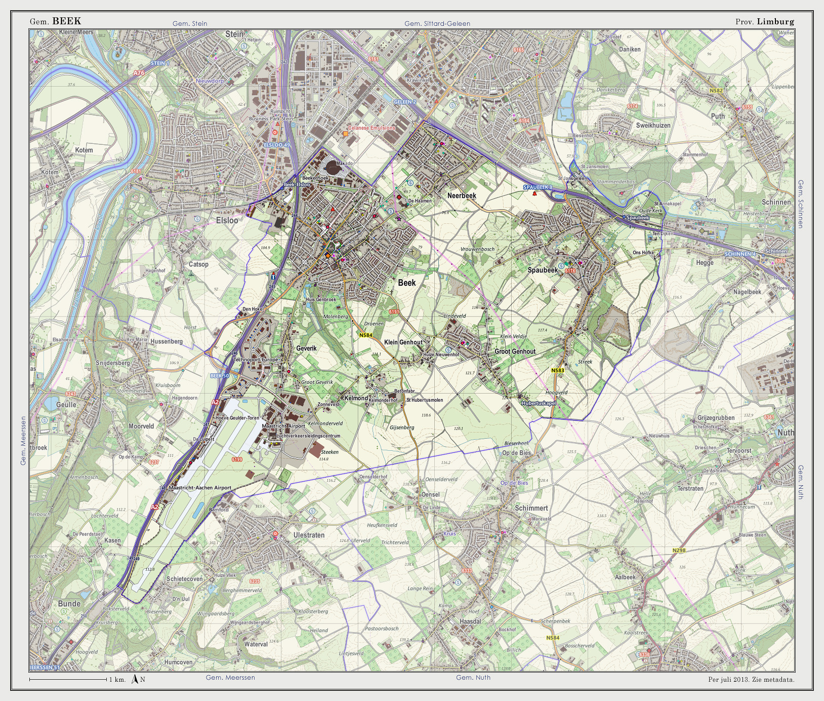 Topografische kaart van gemeente Beek (2013). Samengesteld door user:janwillemvanaalst op basis van de GML open geodata van de BRT/Top10NL (basisregistratie Topografie, Kadaster 2011), vrijgegeven door Kadaster onder de Creative Commons BY licentie. Additionele gegevens uit BAG (8 juli 2013), uit de Open Street Map (9 juli 2013) en uit de Risicokaart. Peildatum kaartbeeld: 9 juli 2013. Samenstelling en kleurenschema: Jan-Willem van Aalst, met QuantumGIS en Photoshop. Zie ook de Legenda.